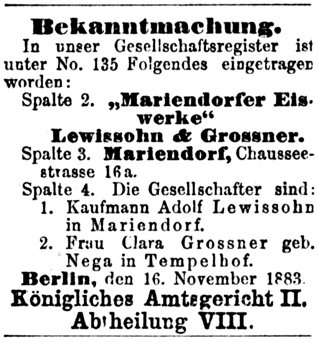 Eintragung der "Mariendorfer Eiswerke" Lewssohn & Grossner in das Gesellschaftsregister Königliches Amtsgericht II Berlin am 16. November 1883